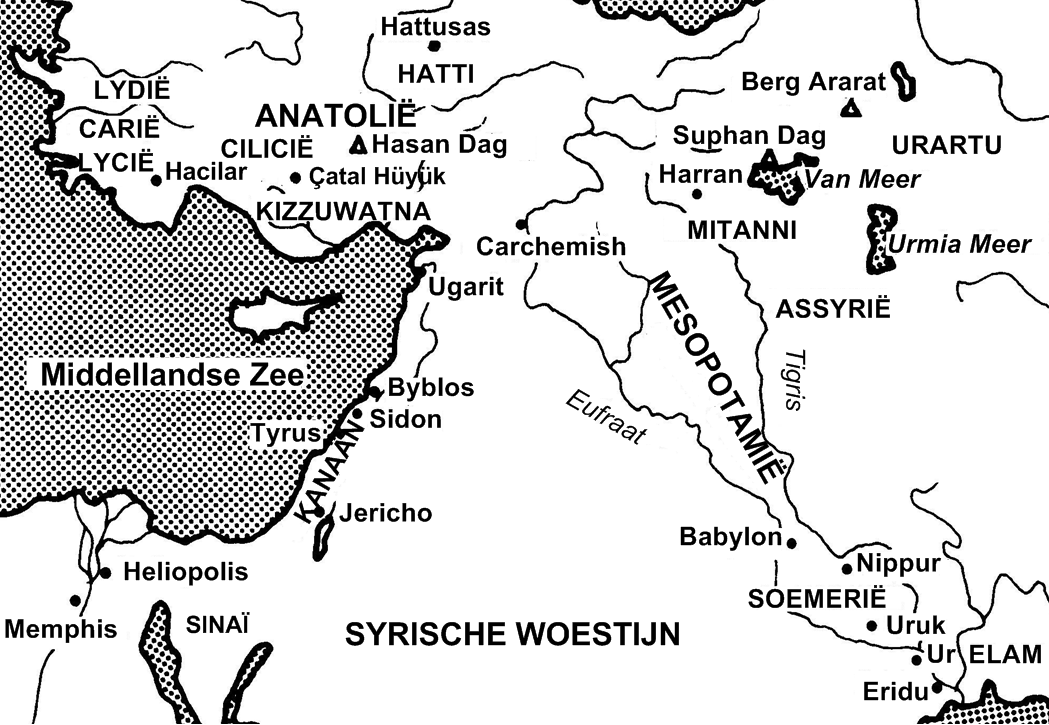 Levant steden